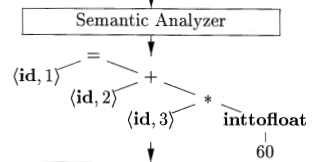 վբզզ